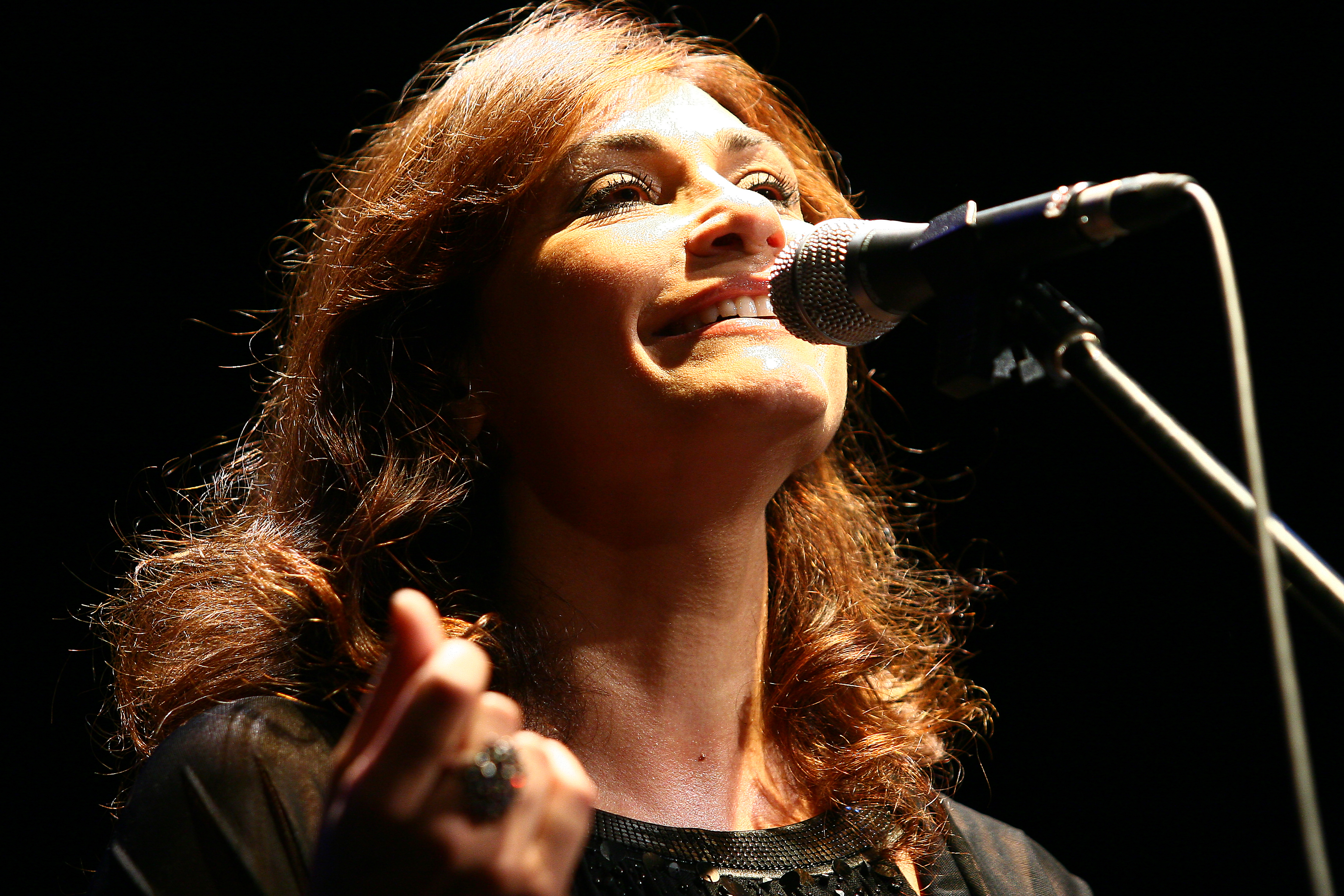 l'attrice Anna Rita Del Piano durante un'esibizione per Concerto Omaggio al Maestro Morricone nel 2008